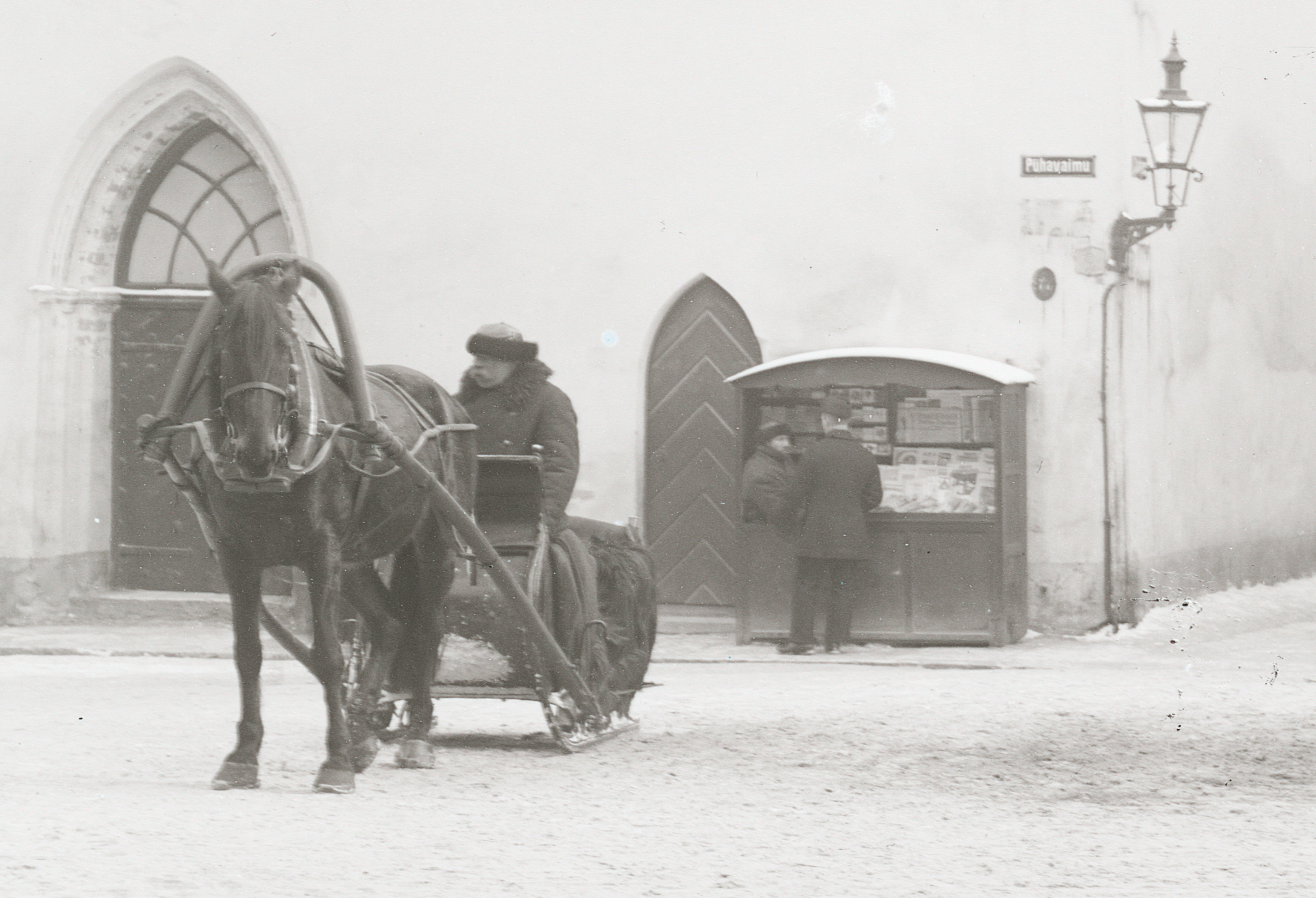 Ajalehekiosk Pühavaimu kiriku juures